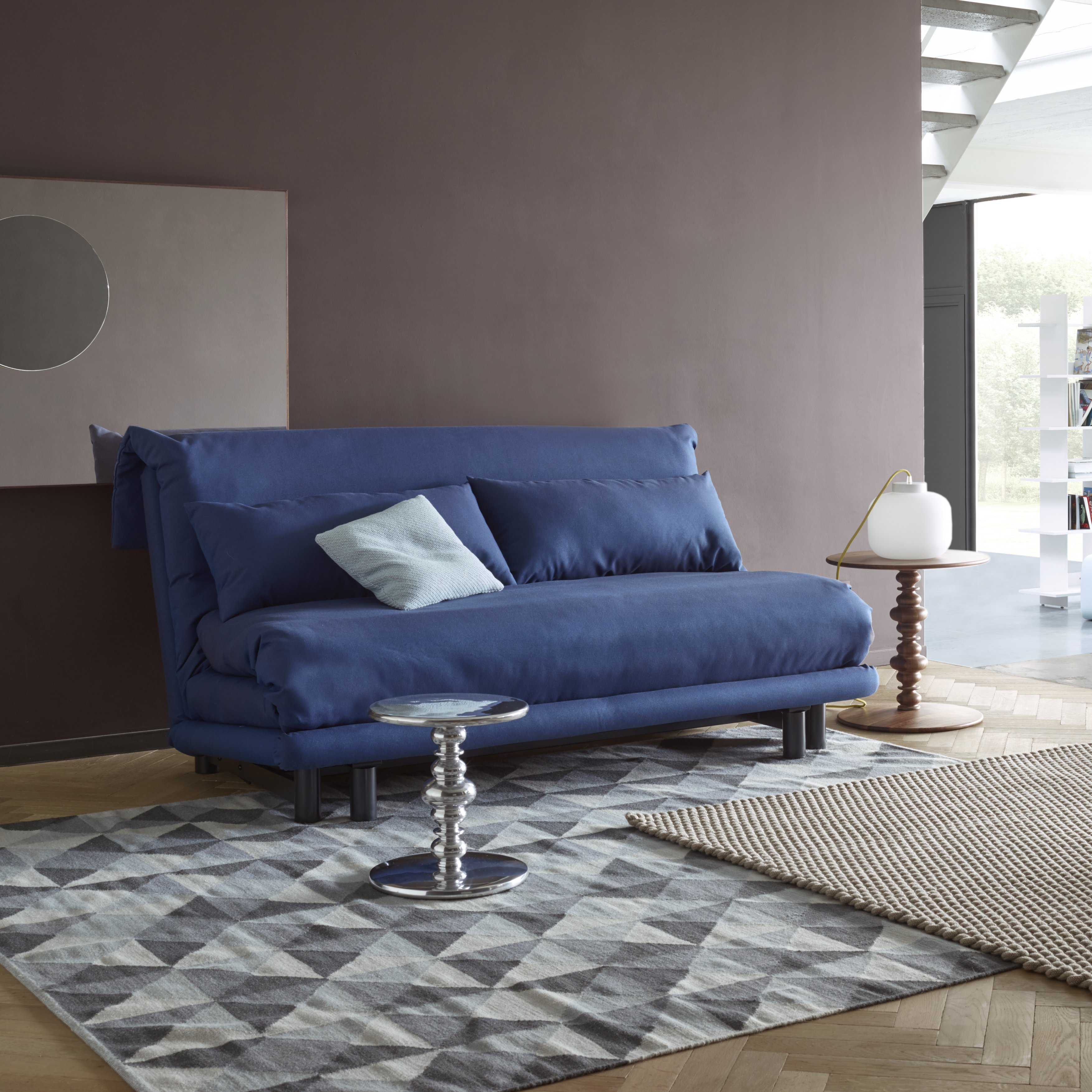 Schlafsofa